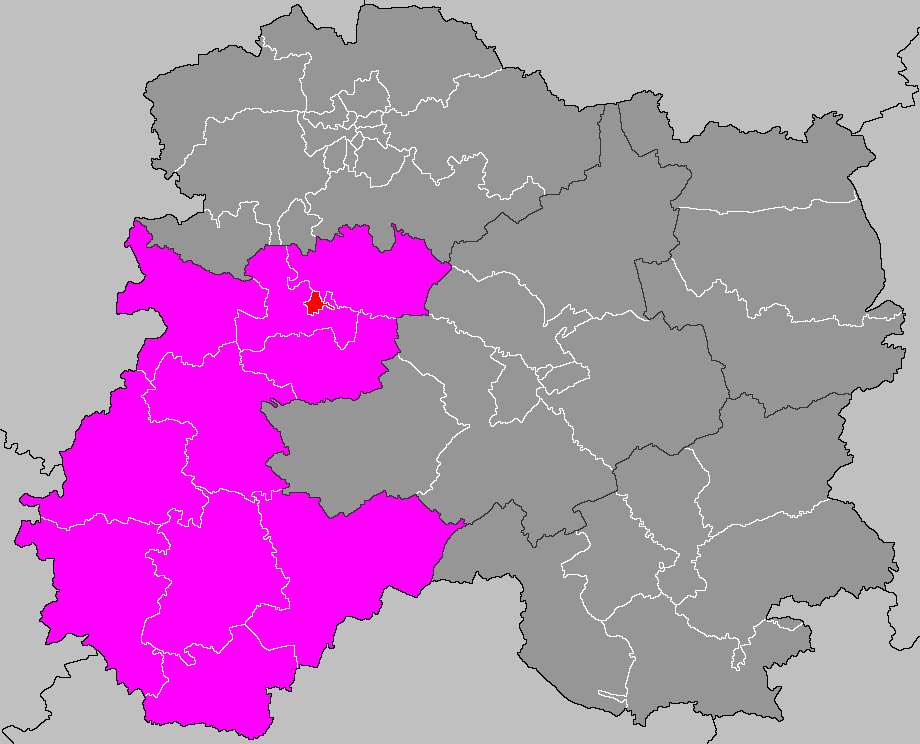 Localisation du canton d'Épernay-1